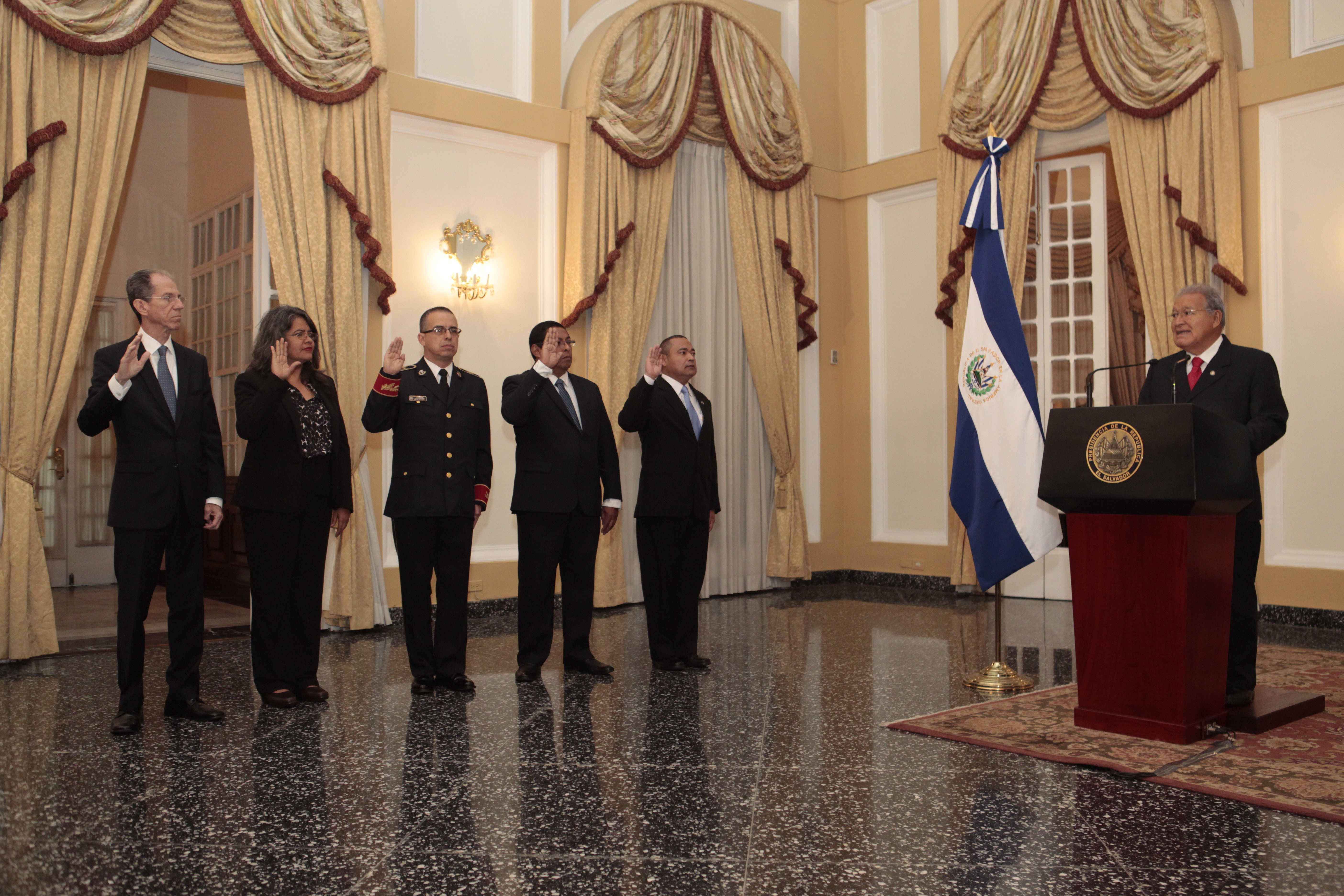 Presidente Salvador Sánchez Cerén juramenta a nuevos funcionarios.